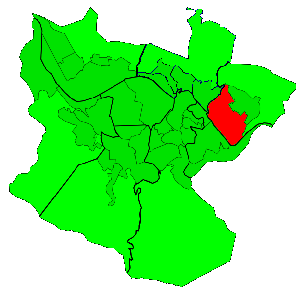 Situación del barrio de Churdínaga en el plano de Bilbao.